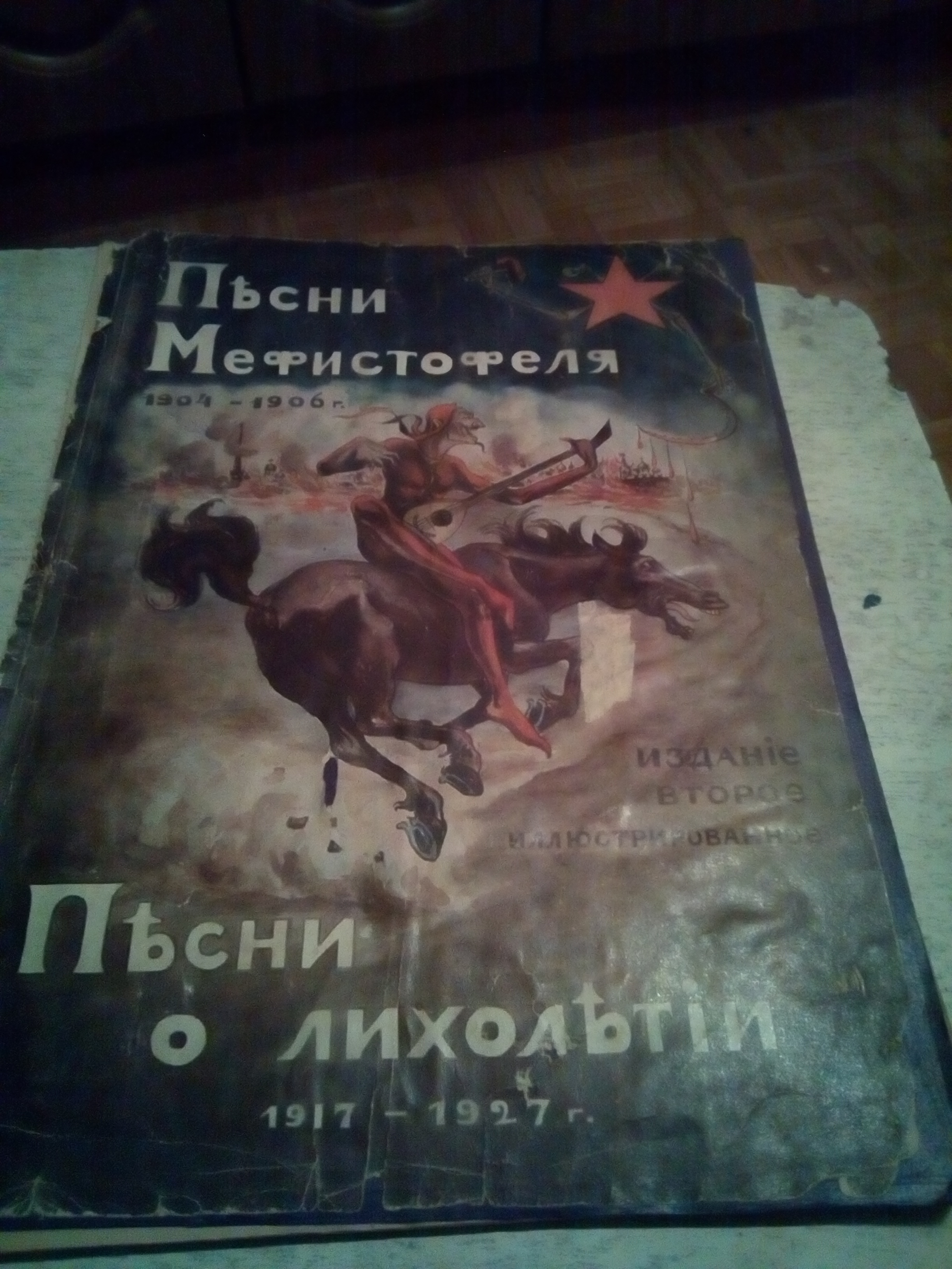 Песни Мефистофеля (1904-1906) и Песни о Лихолетии (1917-1927). Изд. 2-е. (Авт.: Якоби Петр.) - Рига: Изд. Джон П. Бауман, 1927. - 77 с.